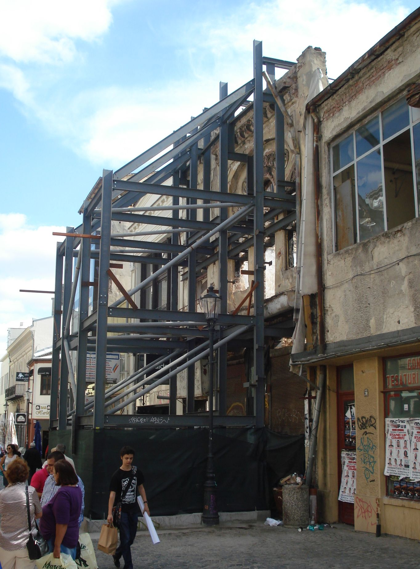 Str. Lipscani nr. 72 (Casă cu prăvălie)